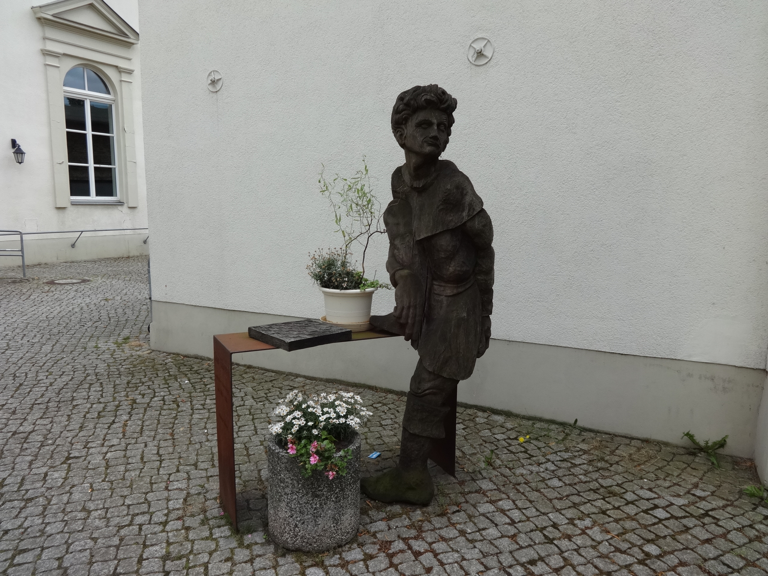 Mit dem Clauert-Rundweg ehrt die Stadt Trebbin den "märkischen Eulenspiegel" Hans Clauert, der im 16. Jahrhundert seinen Schabernack trieb. Figuren aus Bronze und Holz sowie markante Plätze sind nach ihm benannt.